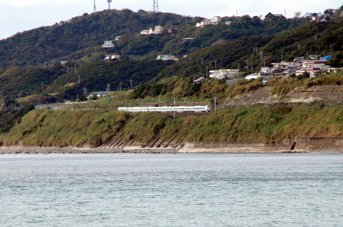 岩代駅 - 切目駅を走行する287系